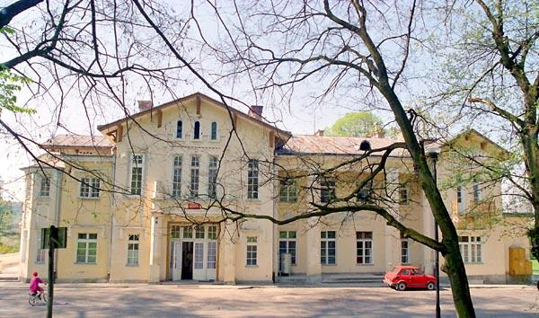 Strzyzow Palace in Poland